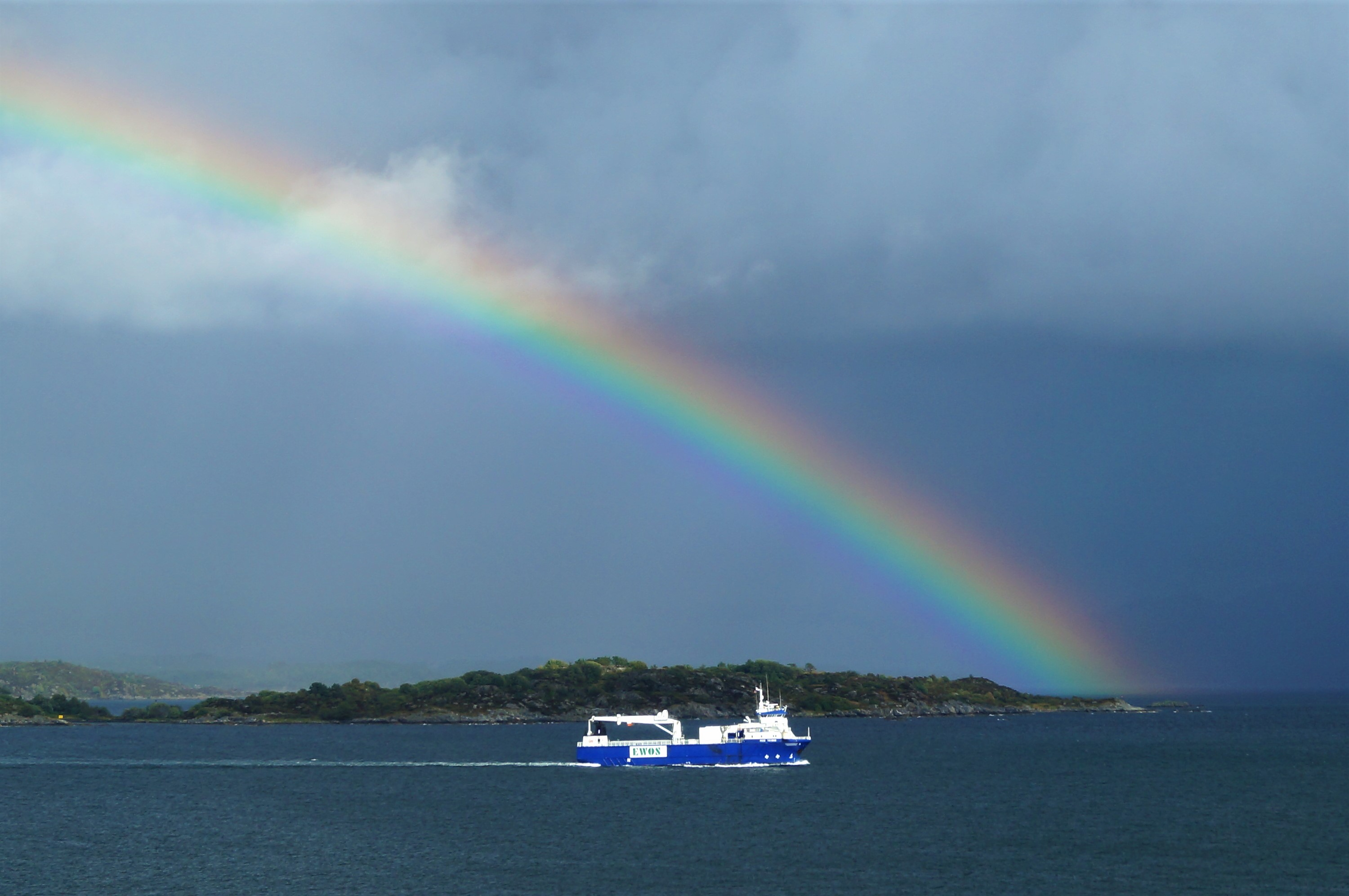 «Feed Tromsø» i Korsfjorden med regnbue i bakgrunnen